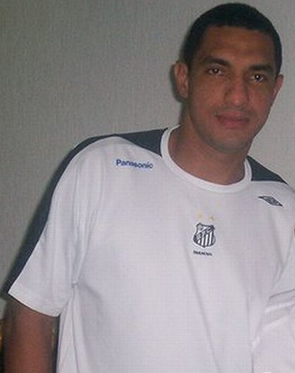 Fábio Costa, jogador de futebol brasileiro.. Remix autorizado pelo autor da foto original, imagem de arquivo pessoal.